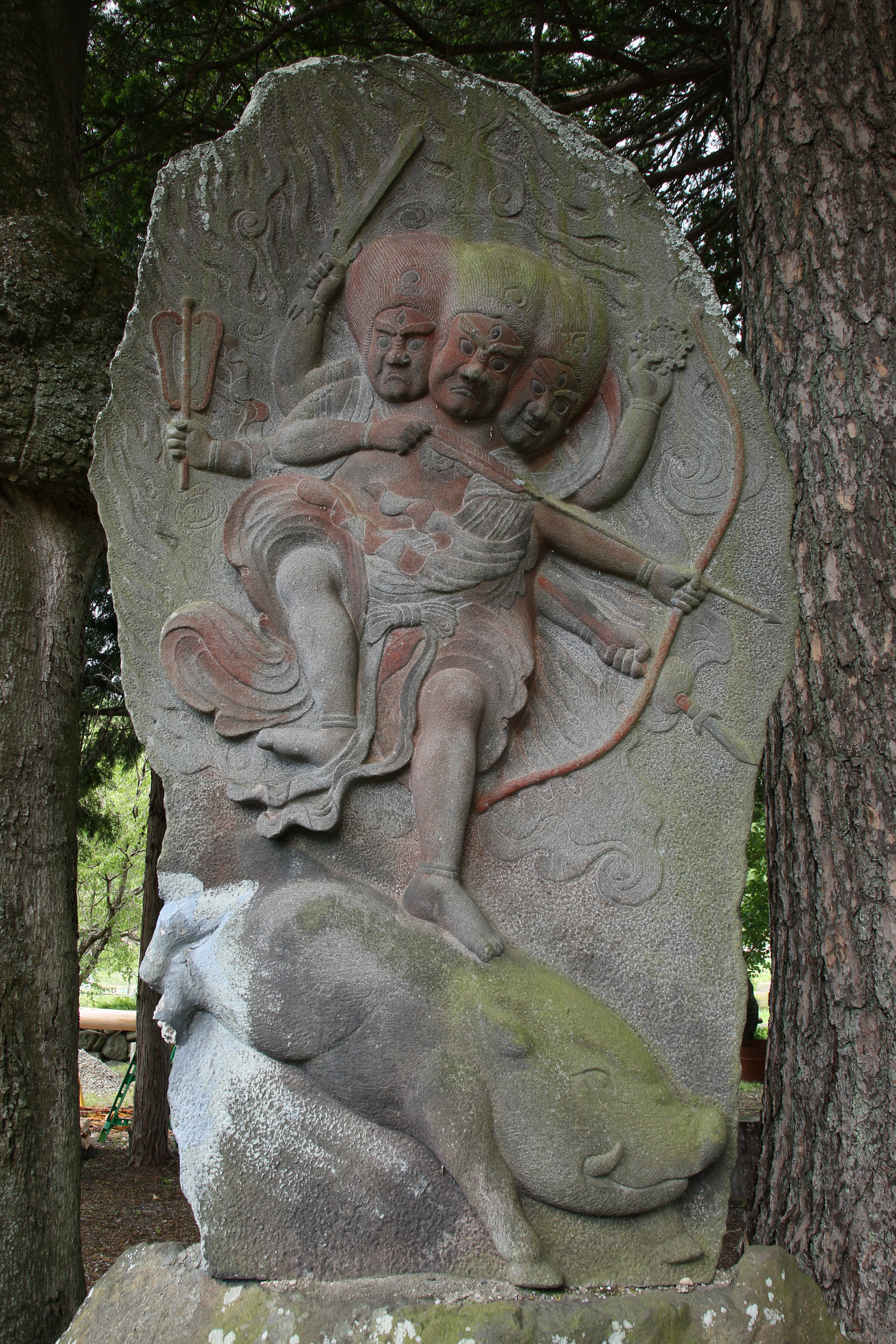 茅野市金沢・権現の森の摩利支天 Canon EOS 7D Mark II